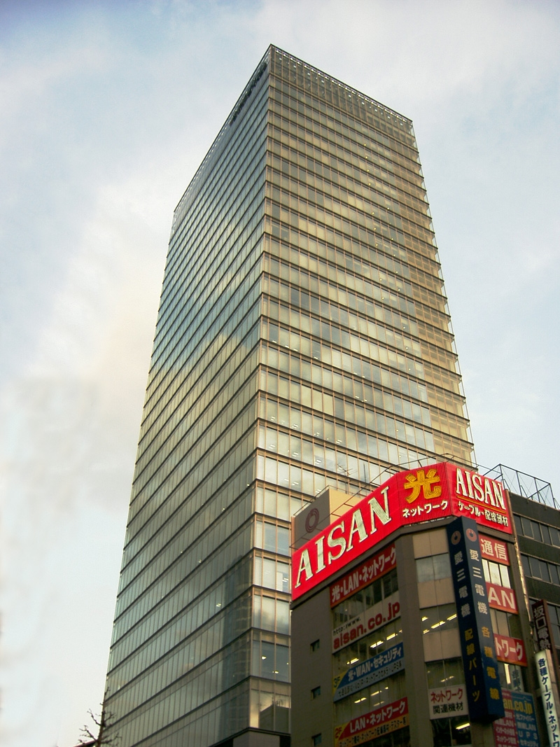 Akihabara_daibiru Akihabara Japan